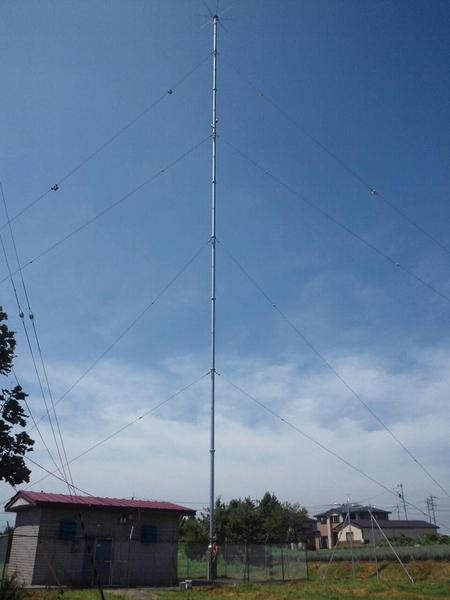 IBC前沢送信所